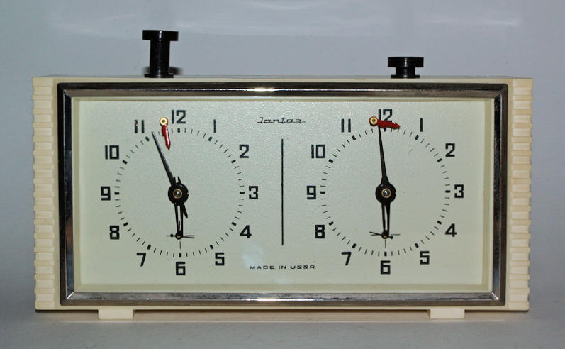 schaakklok vlak voor het vallen van de vlag